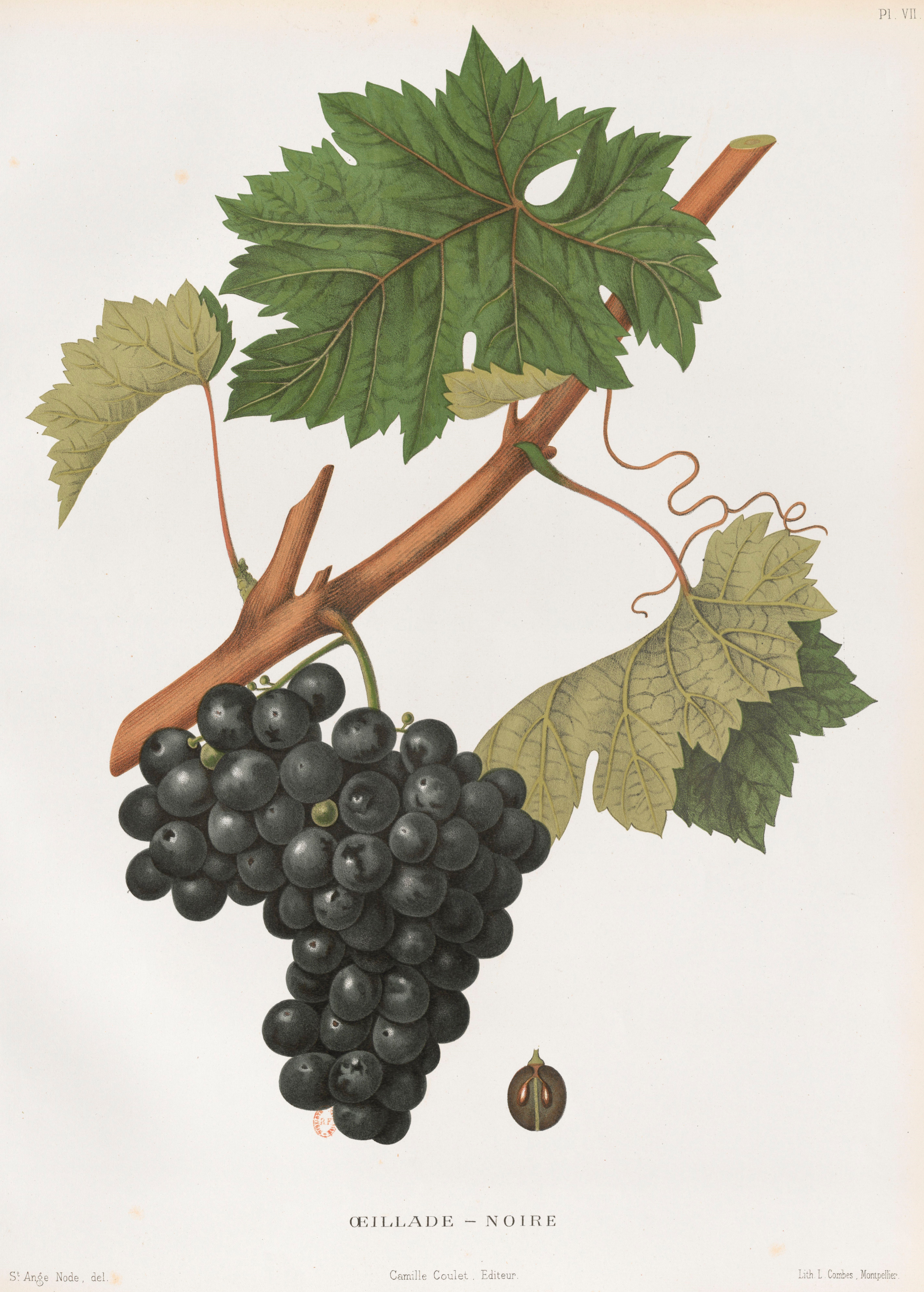 Lithographie du cépage Oeillade noir